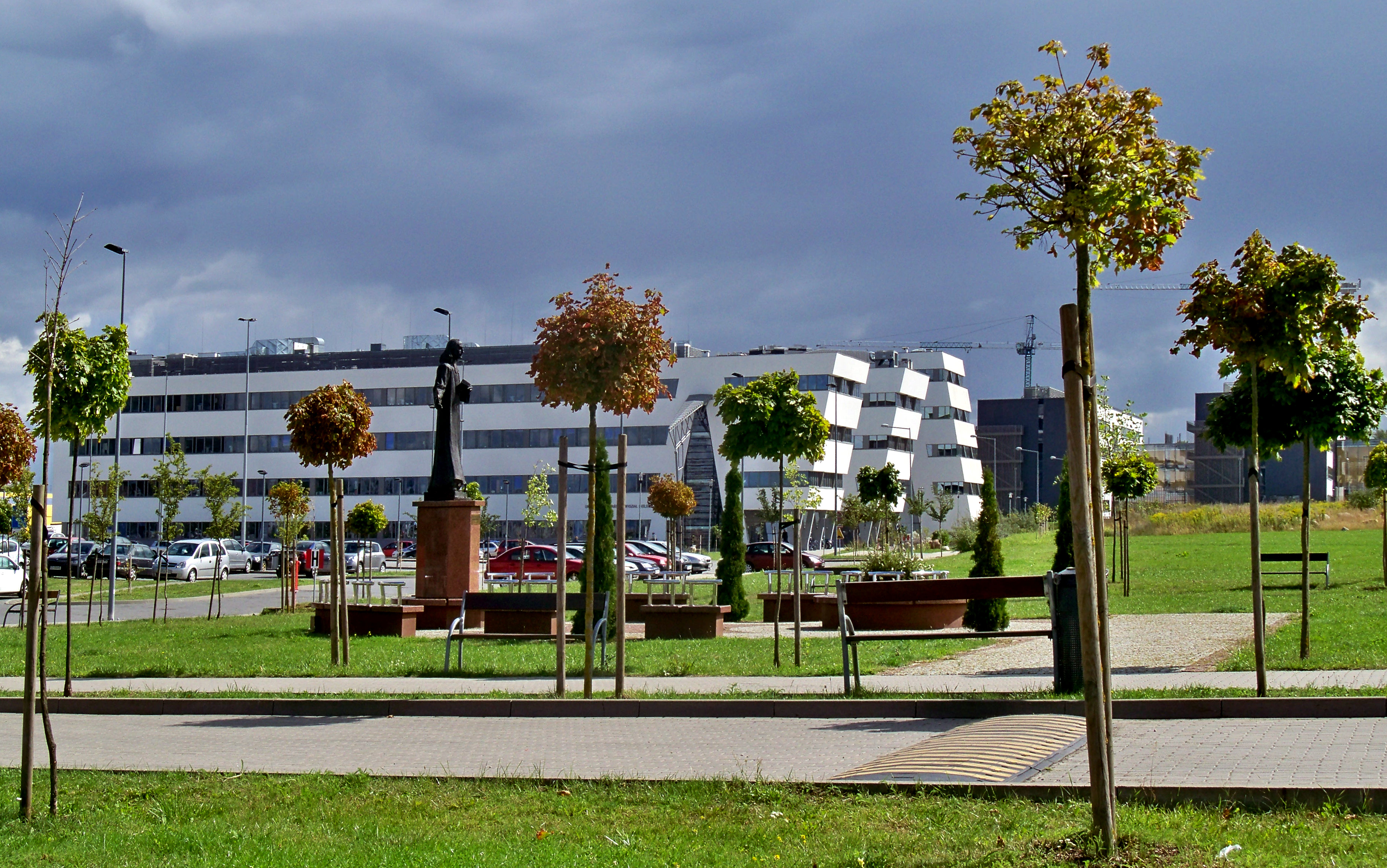 Bałtycki Kampus Oliwa w Gdańsku między ulicami Wita Stwosza a Grunwaldzką. Na pierwszym planie pomnik Mrongowiusza, w tle gmach Wydziału Biologii